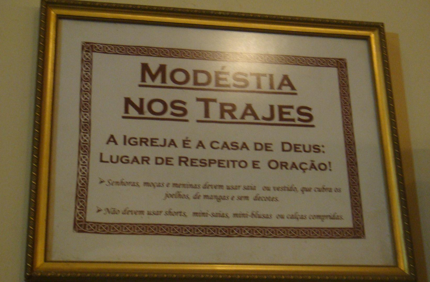 Placa pedindo "Modéstia nos trajes" para os fiéis ma igreja, especialmente o uso de saia e véu para as mulheres, na "Igreja do Imaculado Coração de Nossa Senhora do Rosário de Fátima", da Administração Apostólica São João Vianney, Campos dos Goytacazes, RJ, Brasil.